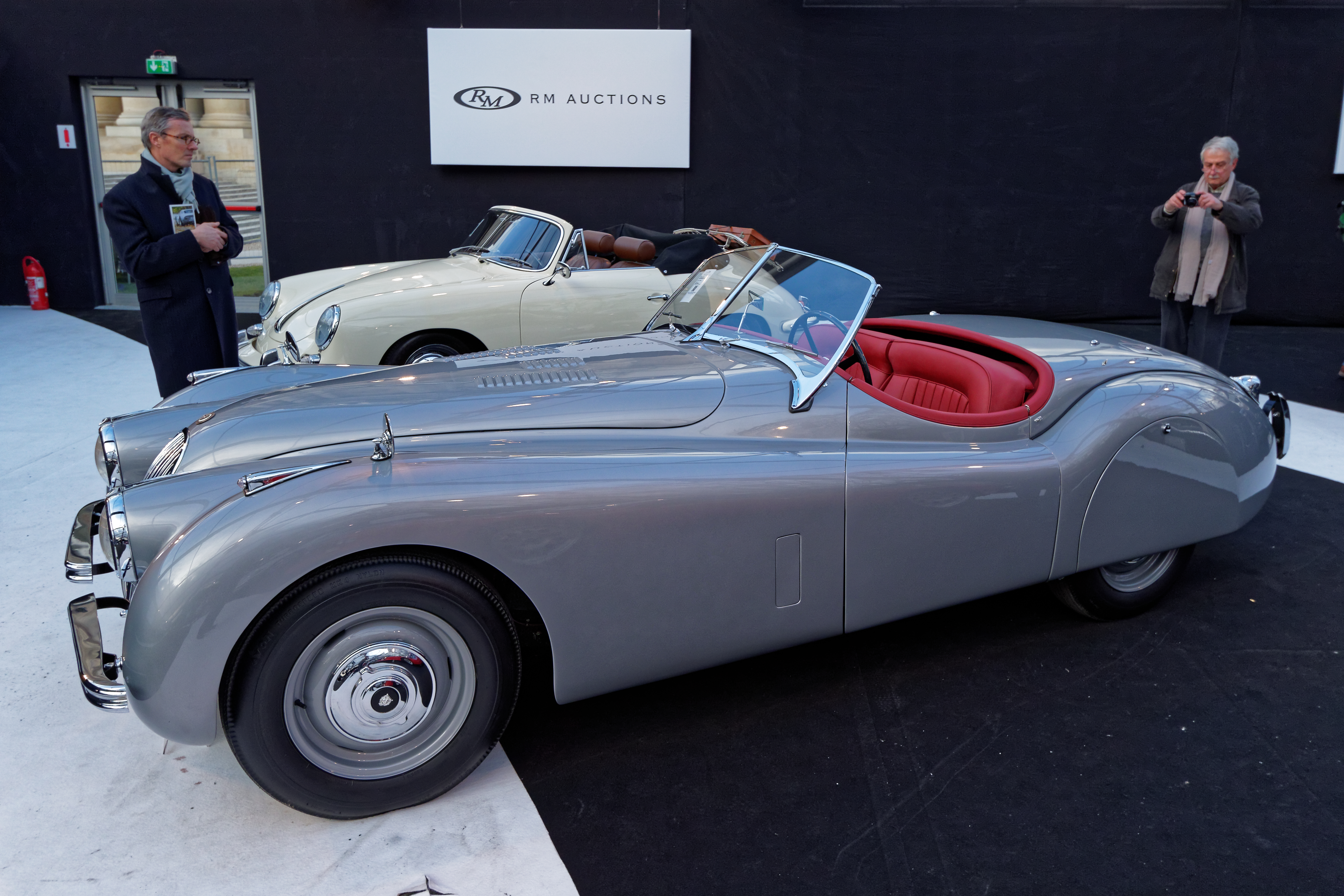 La vente aux enchères RM auctions aux pied des Invalides à Paris le 4 février 2015.